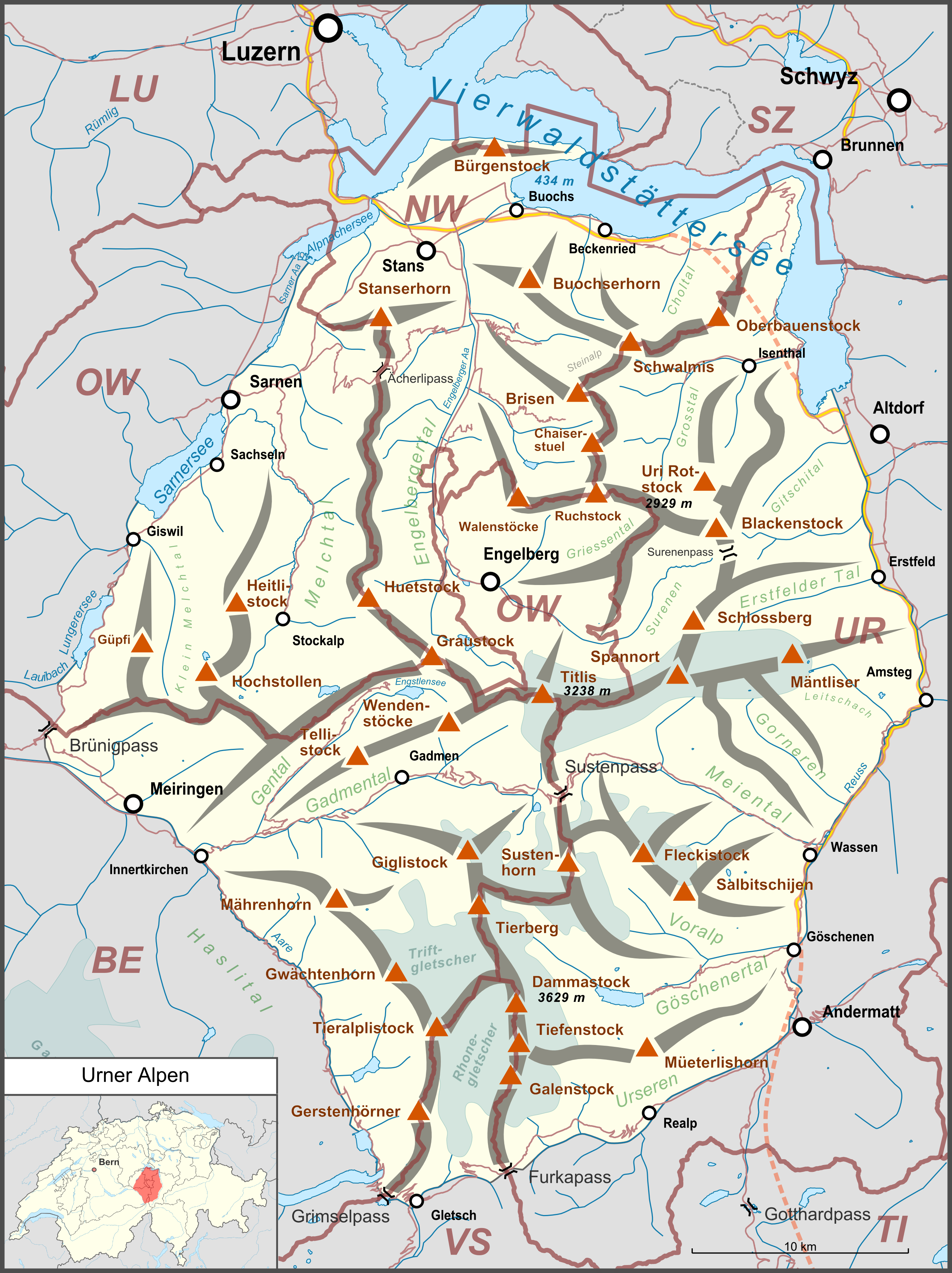 Lagekarte der Urnern Alpen